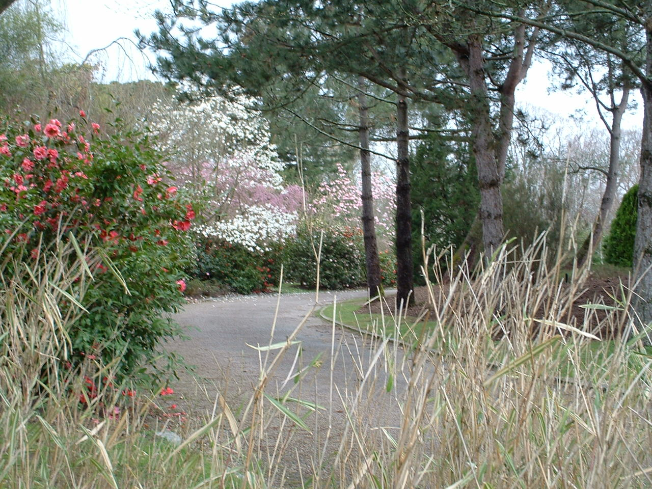 Aperçu du parc de la Morinière au début du printemps